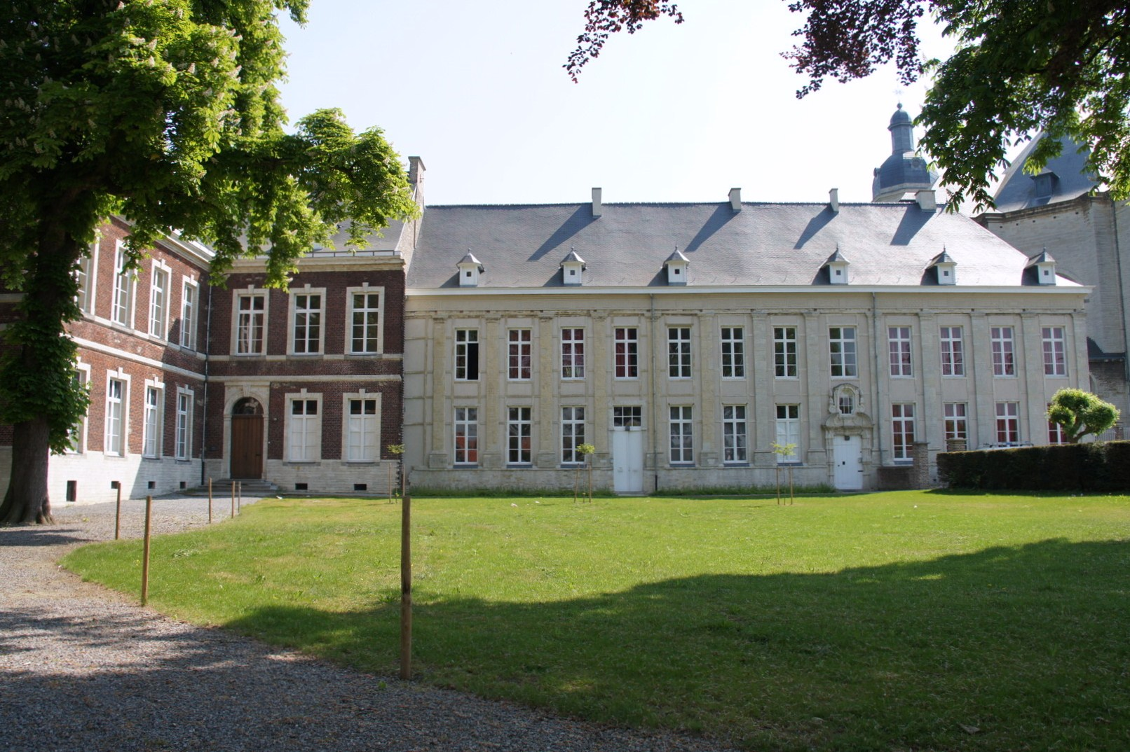 Het nieuwe abtskwartier werd gebouwd in 1776, een neoclassicistisch gebouw ontworpen door architect Laurent-Benoît Dewez. Het abtskwartier bestaat uit een winkelhaakvormig gebouw met 2 ingangen. Op het gelijkvloers zijn er 7 plaatsen en een grote inkomhal. De 19de eeuwse tuin die aangelegd werd is een tuin voor de woningen ingericht in het gastenkwartier en het nieuwe abtskwartier.